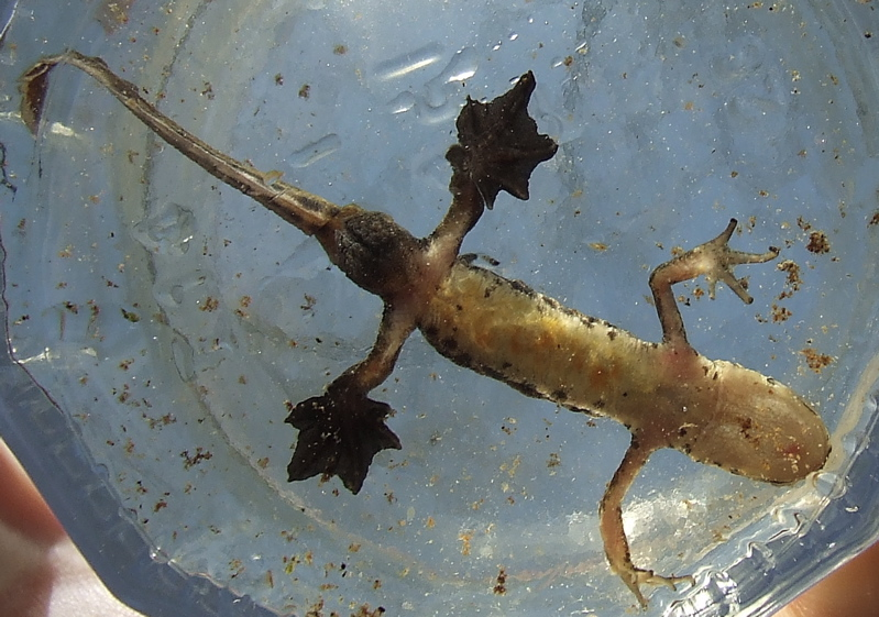 Mâle de triton palmé (Triturus helveticus), forêt de Montécot, Eure-et-Loir, France (crop, voir image originale, lien ci-dessous)